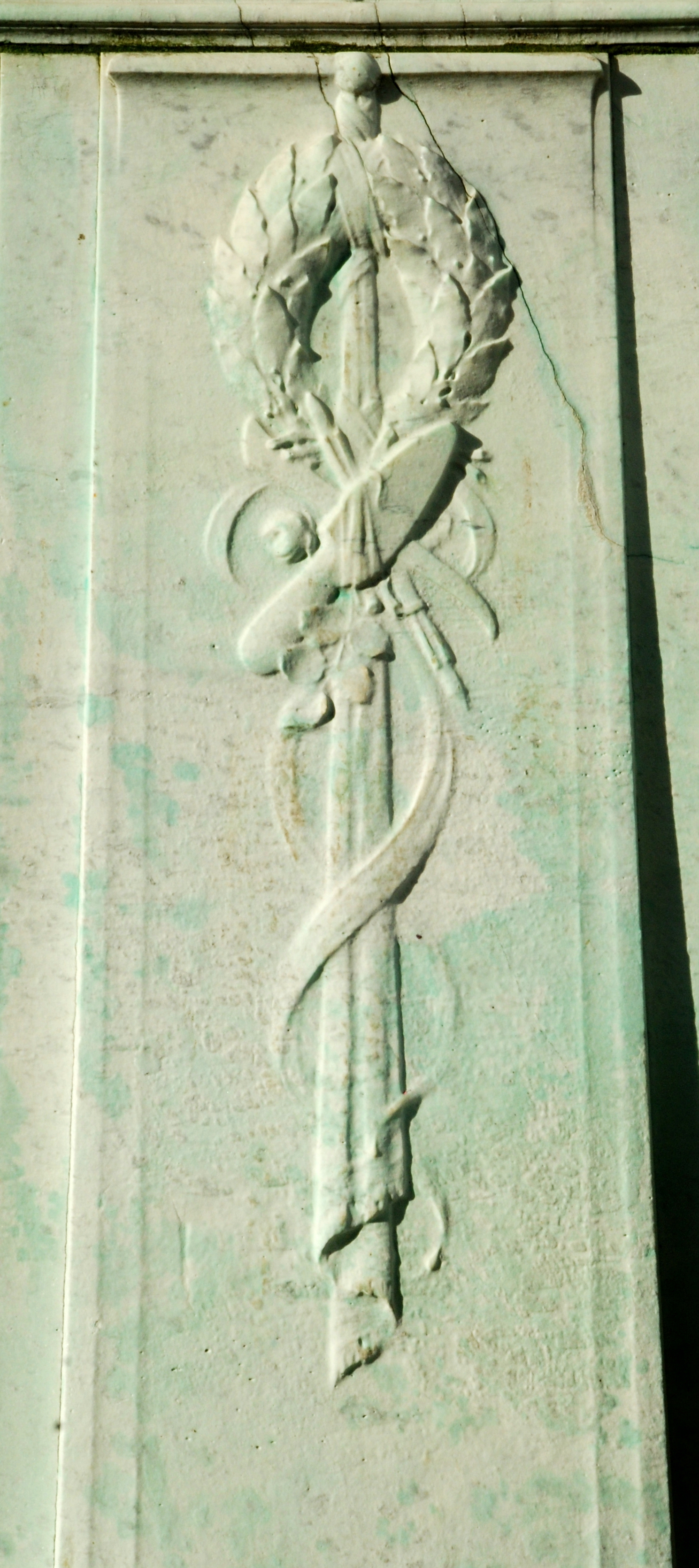 Belgique - Bruxelles - Monument Julien Dillens